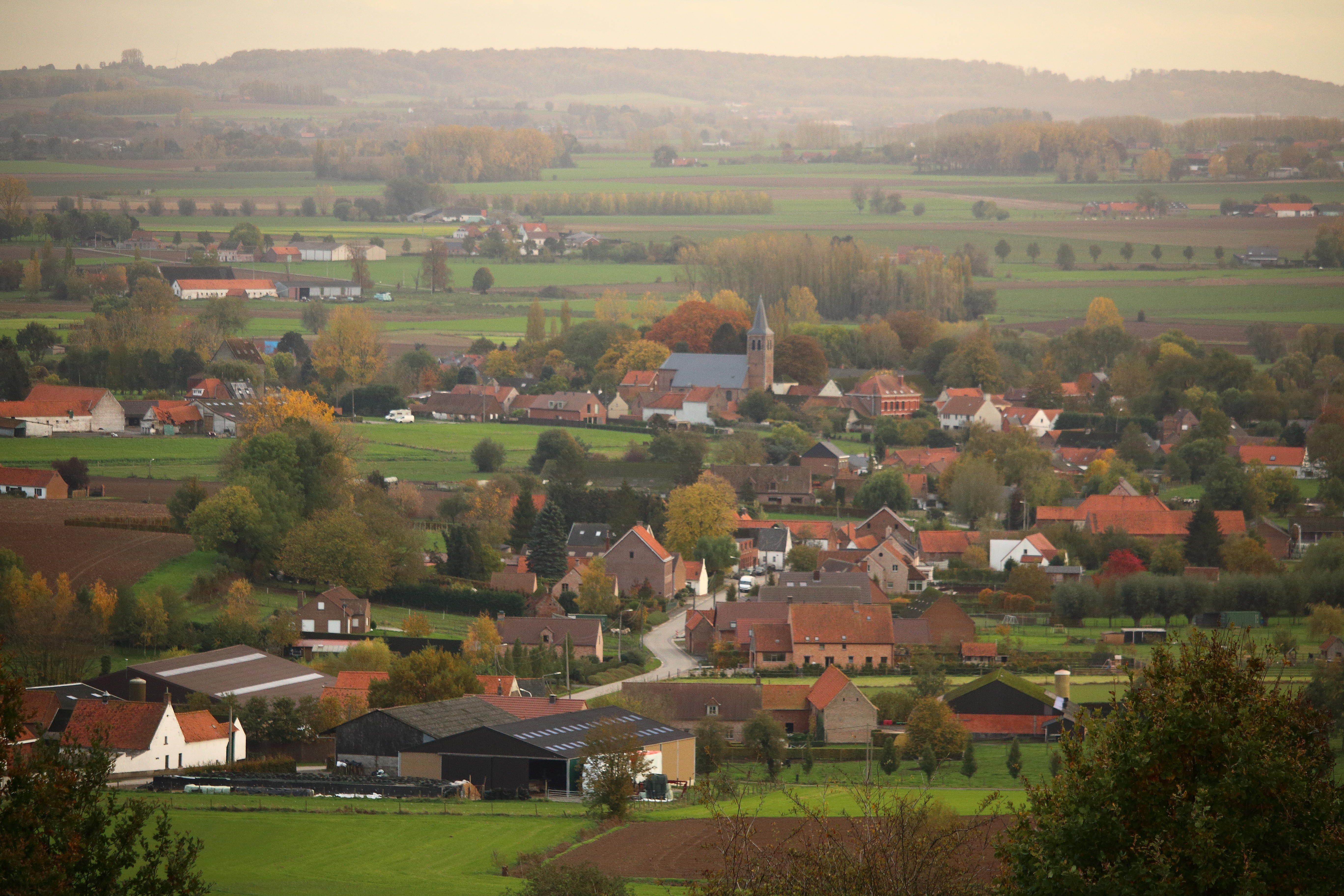 Russeignies vu du Mont de l'Enclus - Rozenaken gezien vanop de Kluisberg, Belgique/België